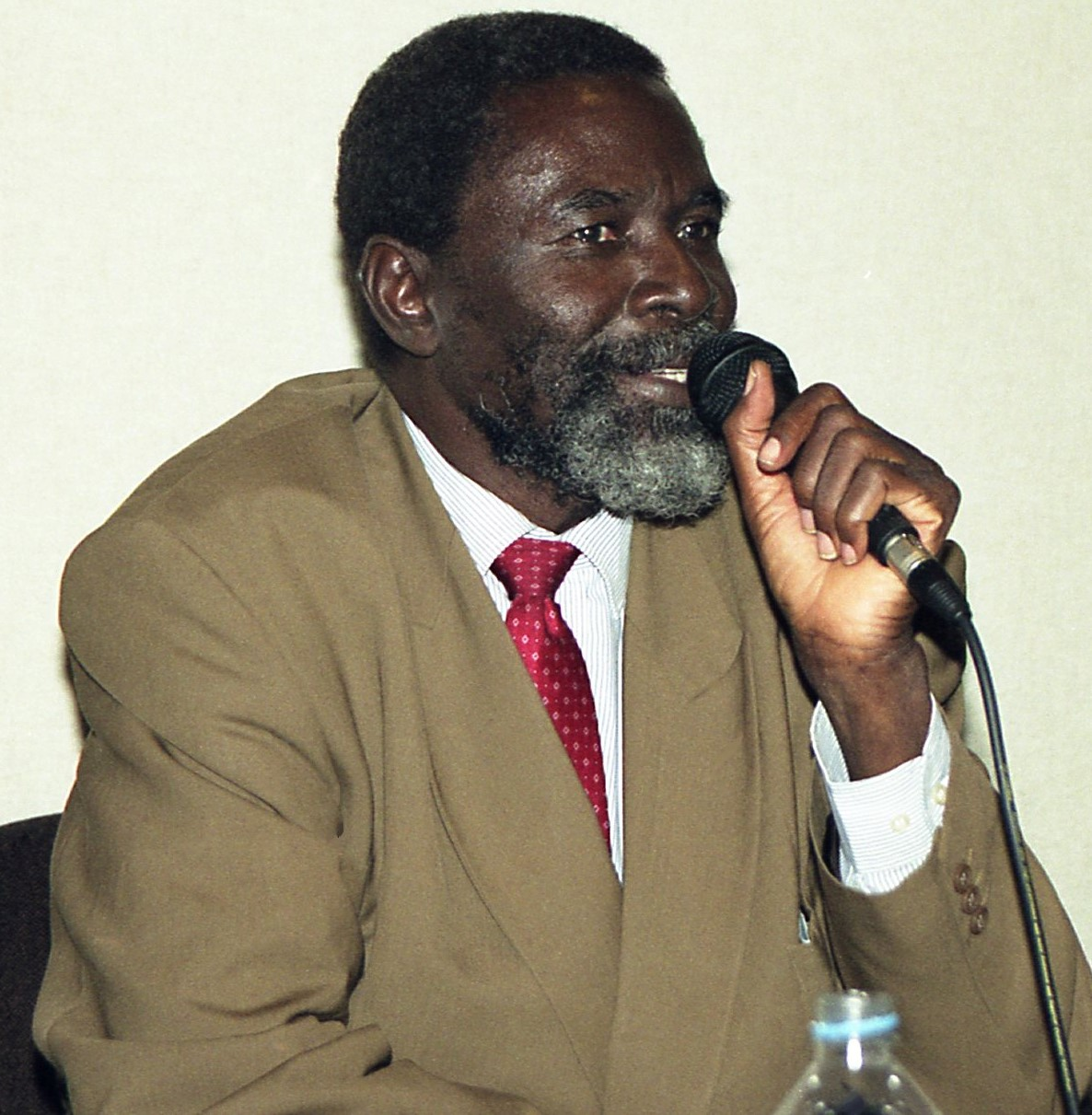 Ngarlejy Yorongar, homme politique tchadien